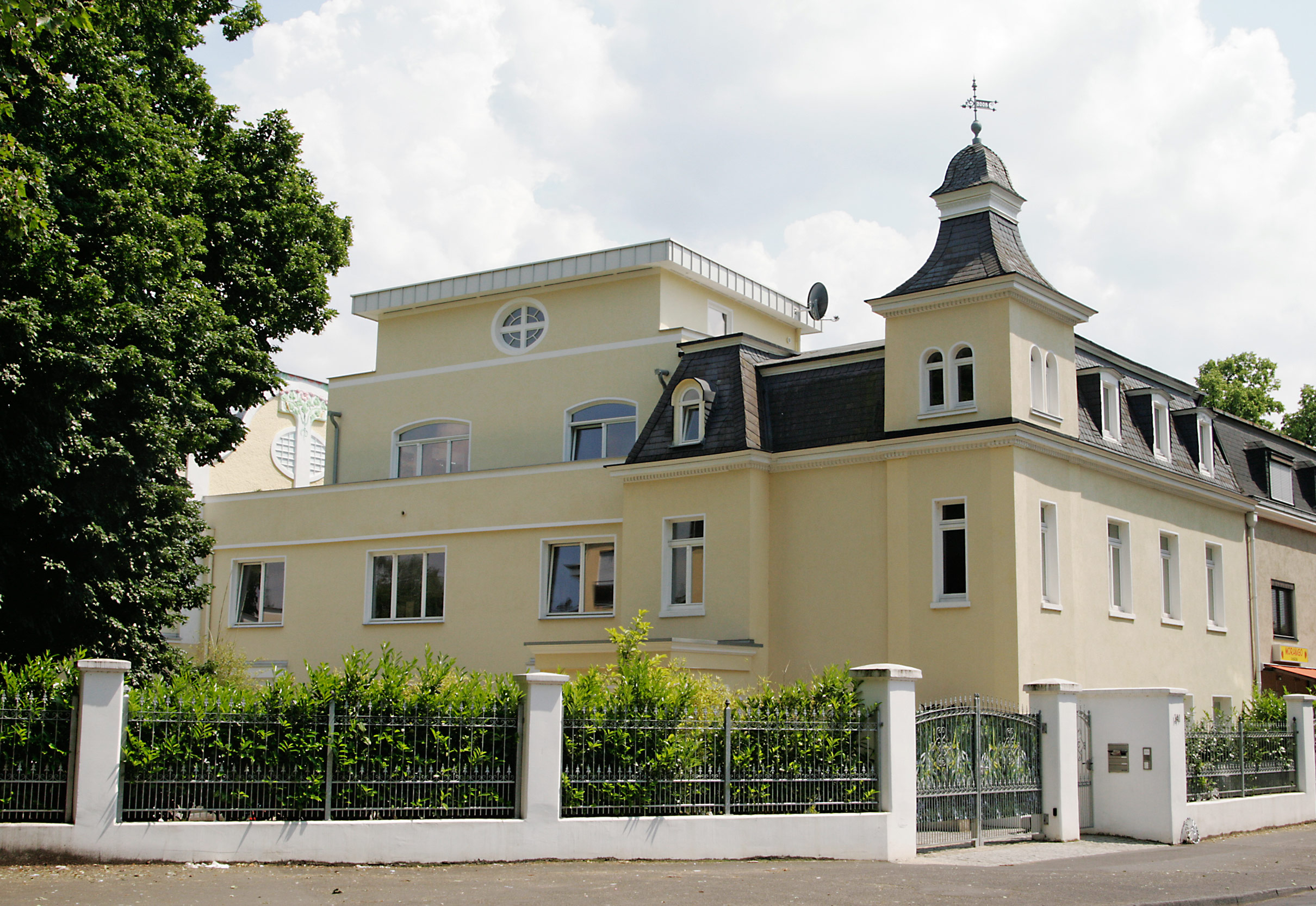 „Villa Friede“ in Bad Godesberg, Ortsteil Mehlem, Mainzer Straße 143